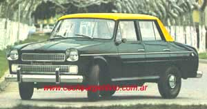 Rastrojero Conosur. Vehículo empleado como taxi